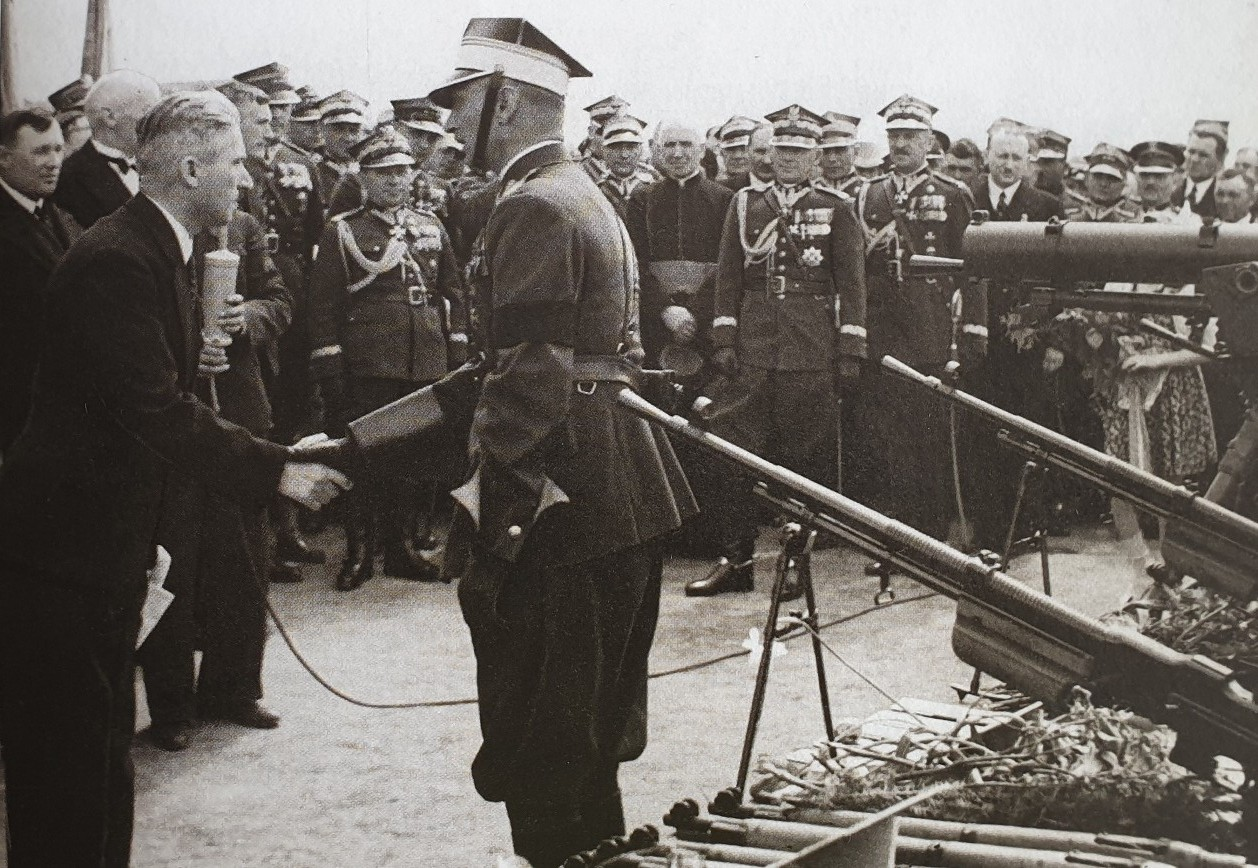 Święto pułkowe 11 Pułku Ułanów. Przekazanie sprzętu dla dowódcy pułku